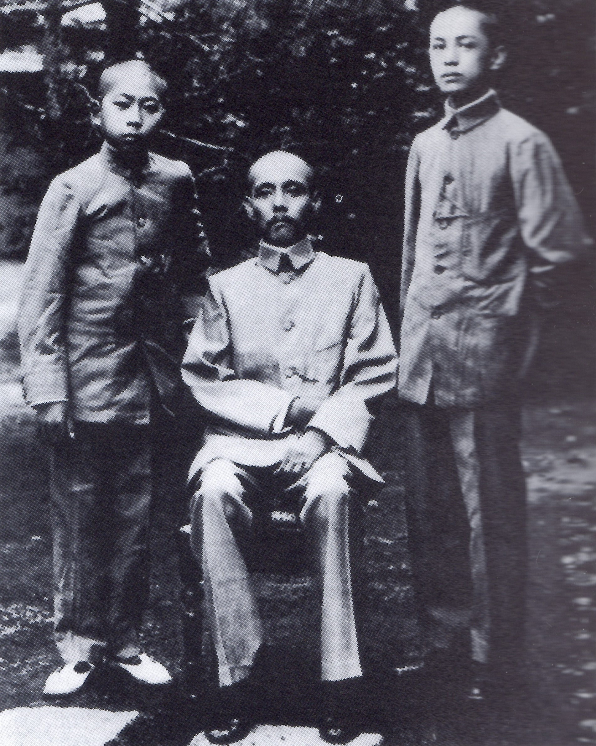 堀親広の肖像写真(中央)。